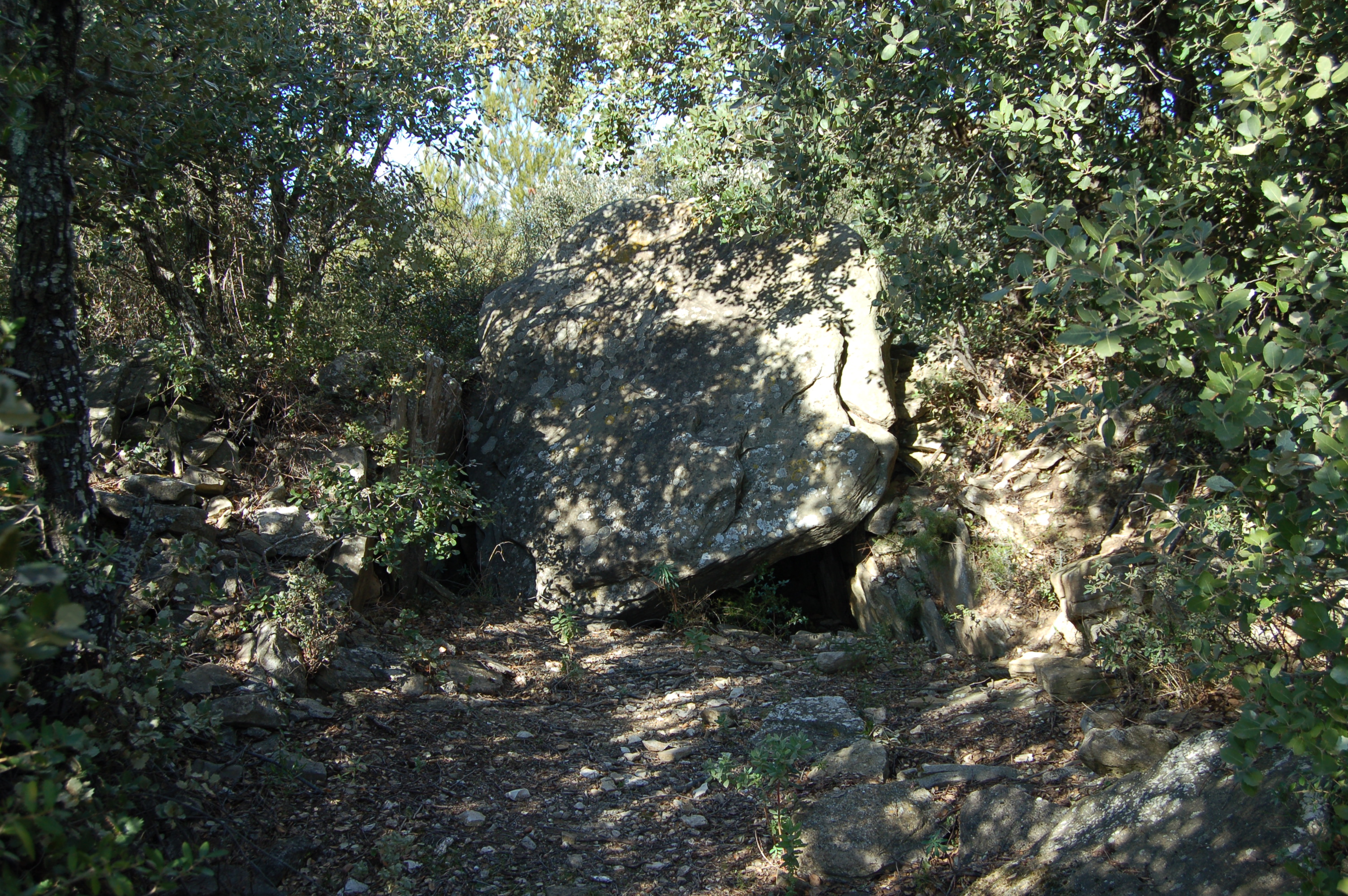 Dolmen de la Cigaliere, Les SéditionsMétairie de Balzabé (Classé, 1981)